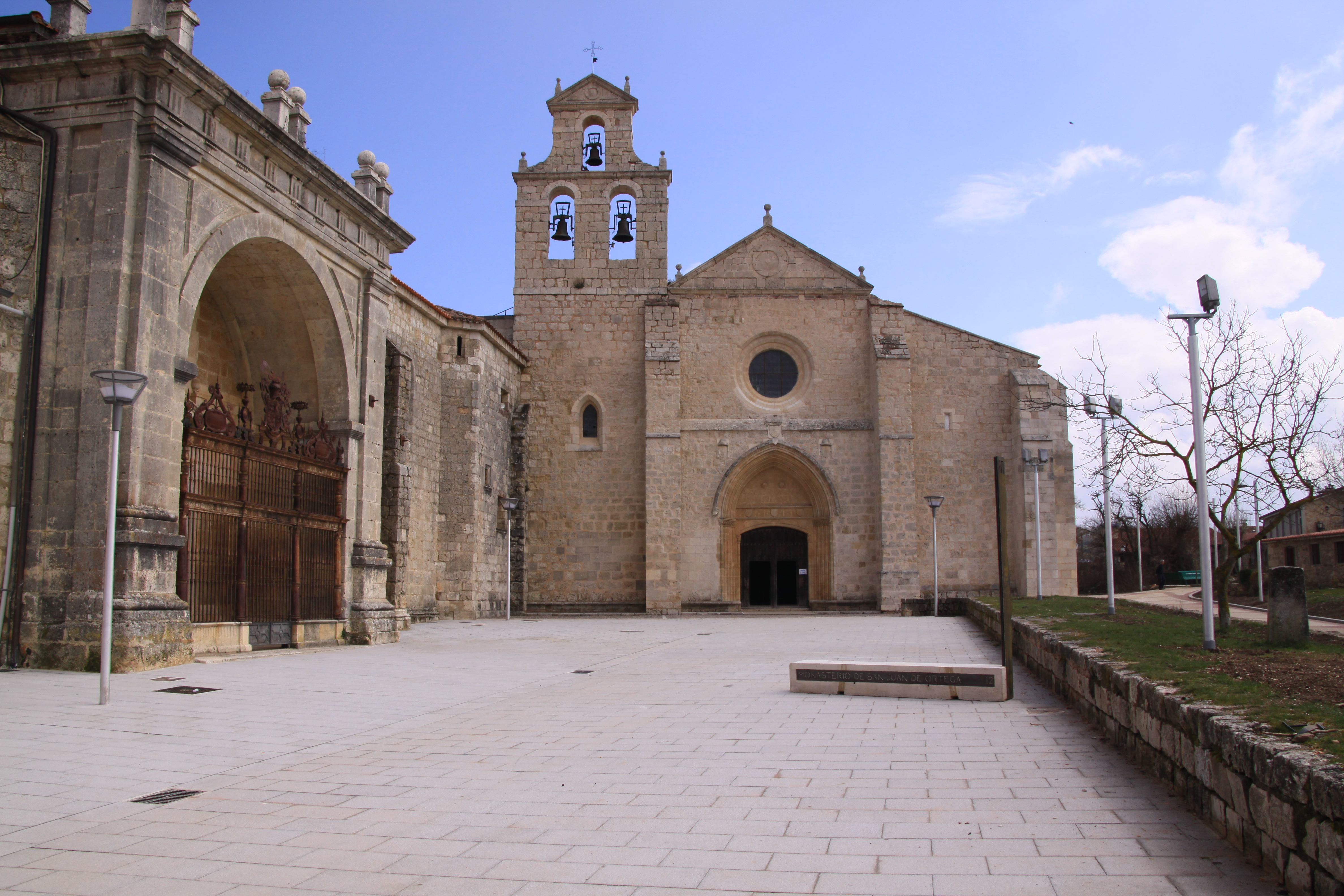 Monasterio de San Juan de Ortega (Burgos) a la izquierda la capilla de San Nicolás al fondo la Iglesia principal